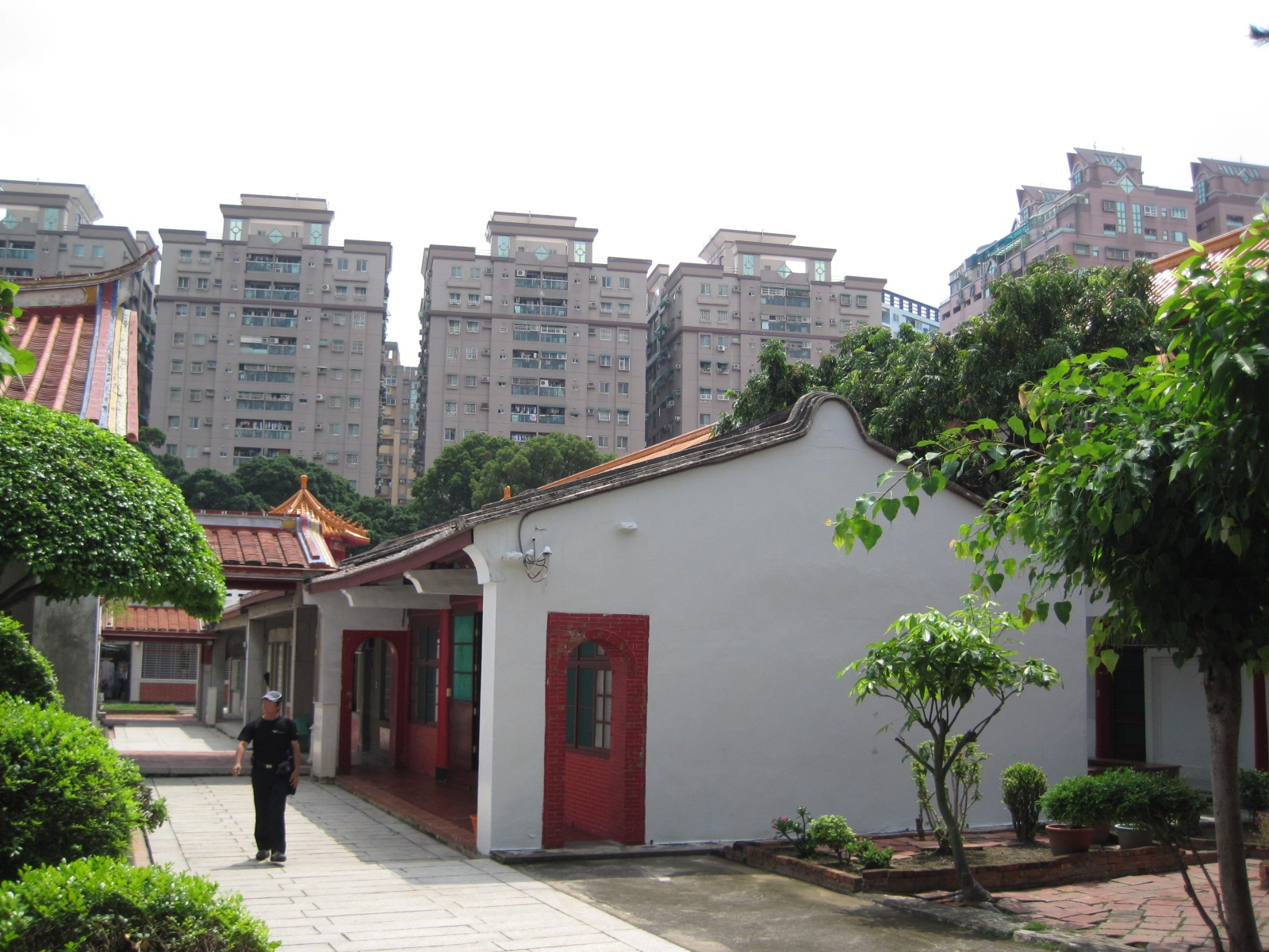 臺南開元寺右護龍